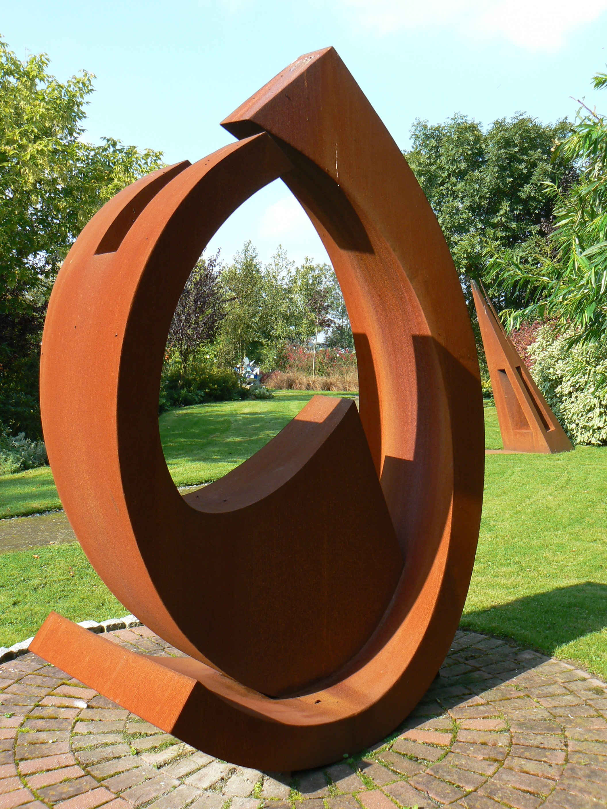 sculpture Scarlatti (2006), Sammlung Wübbena in Funnix/Germany